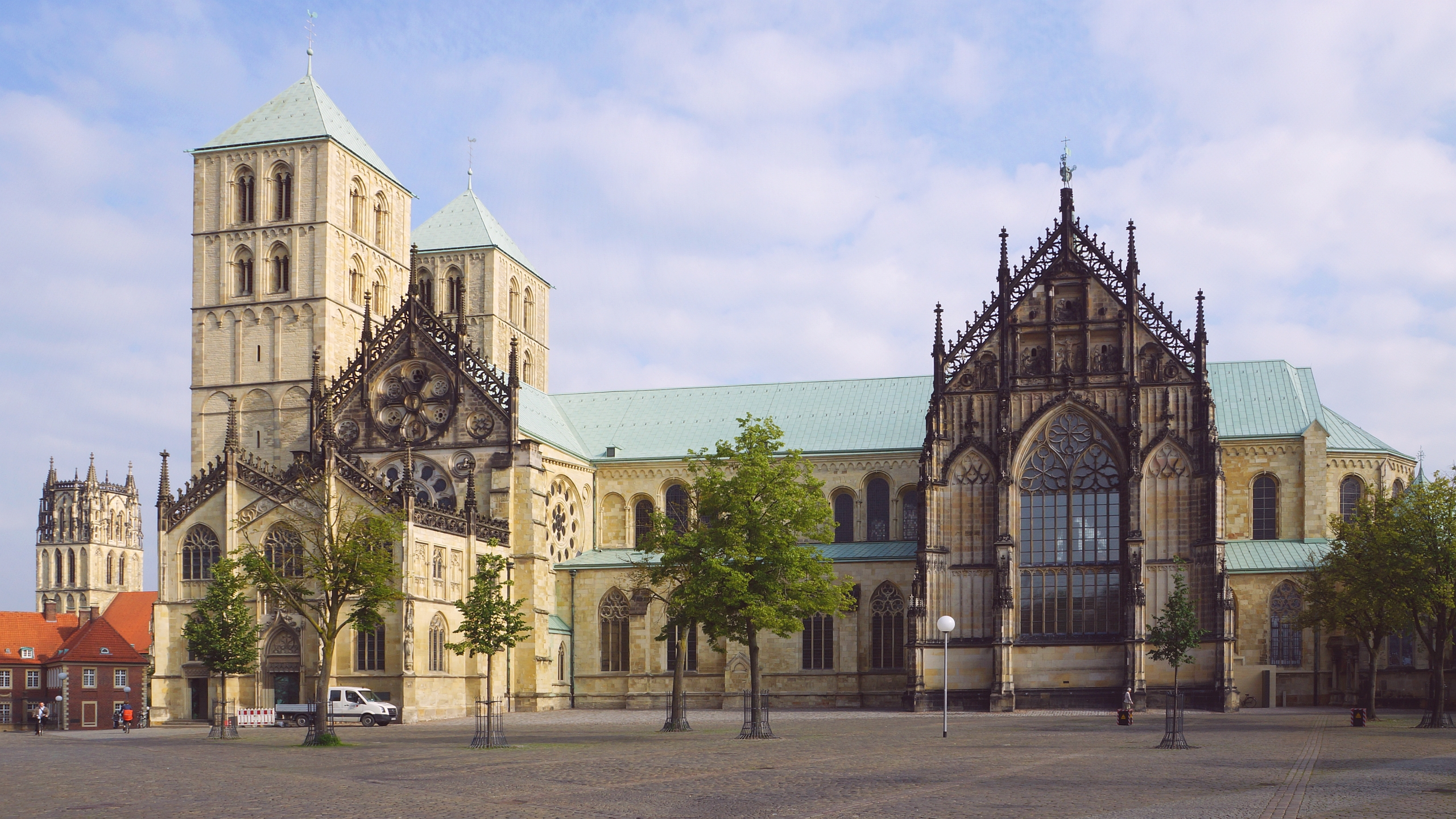 St.-Paulus-Dom, erbaut ab 805 und diverse Male wieder erbaut 1956, röm.-kath. Kathedrale von Münster in Nordrhein-Westfalen Deutschland - Foto Wolfgang Pehlemann DSC04671